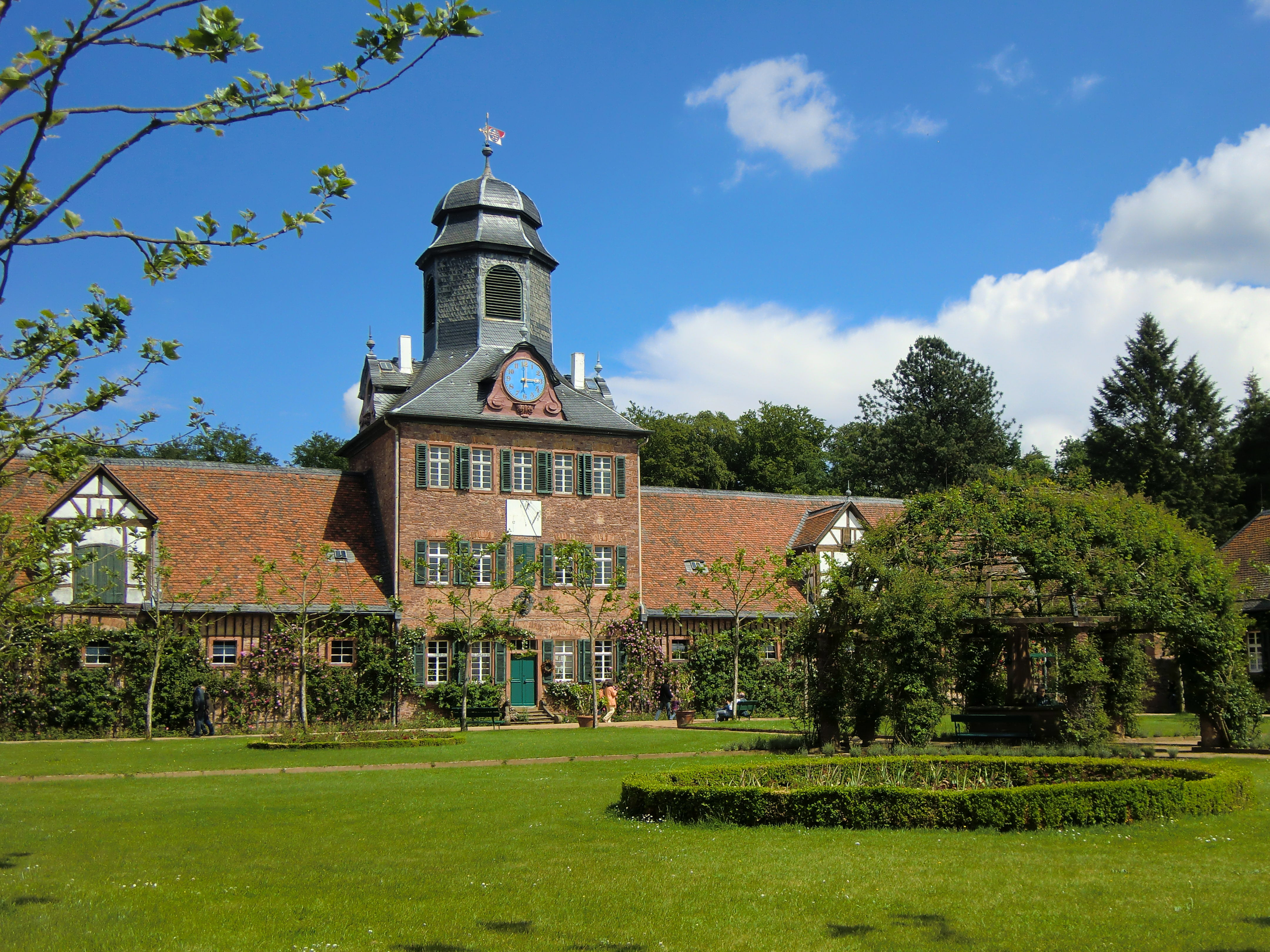 Das Gebäude gegenüber dem Herrenhaus des Schlosses Wolfsgarten bei Langen (Hessen). Aufgenommen im Innenhof während der Öffnung der Schlossanlage für Besucher.